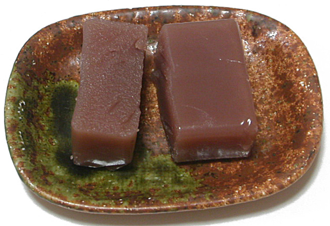 大須ないろ。一口ないろです。切り口も写しました。